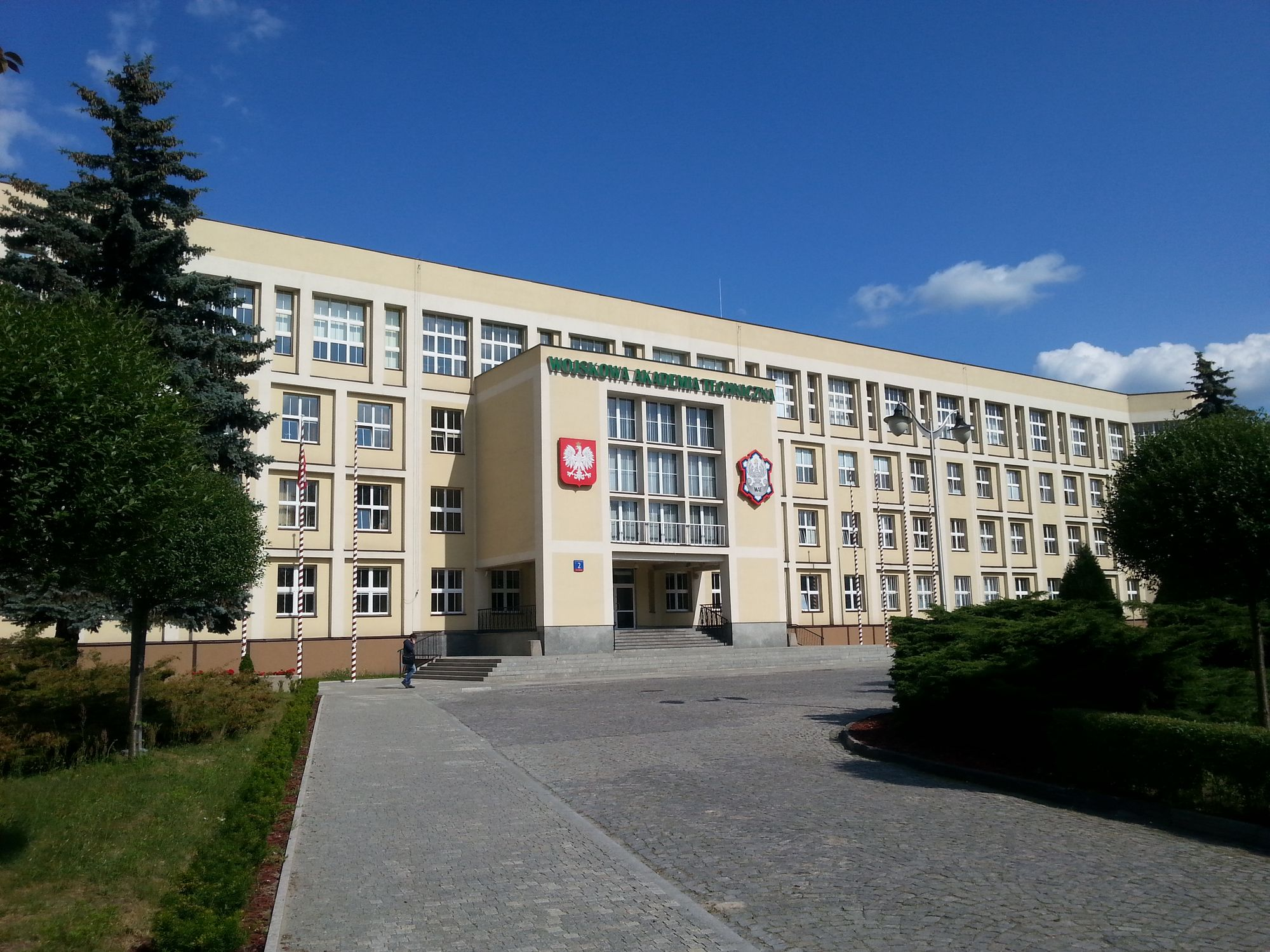 Budynek główny WAT